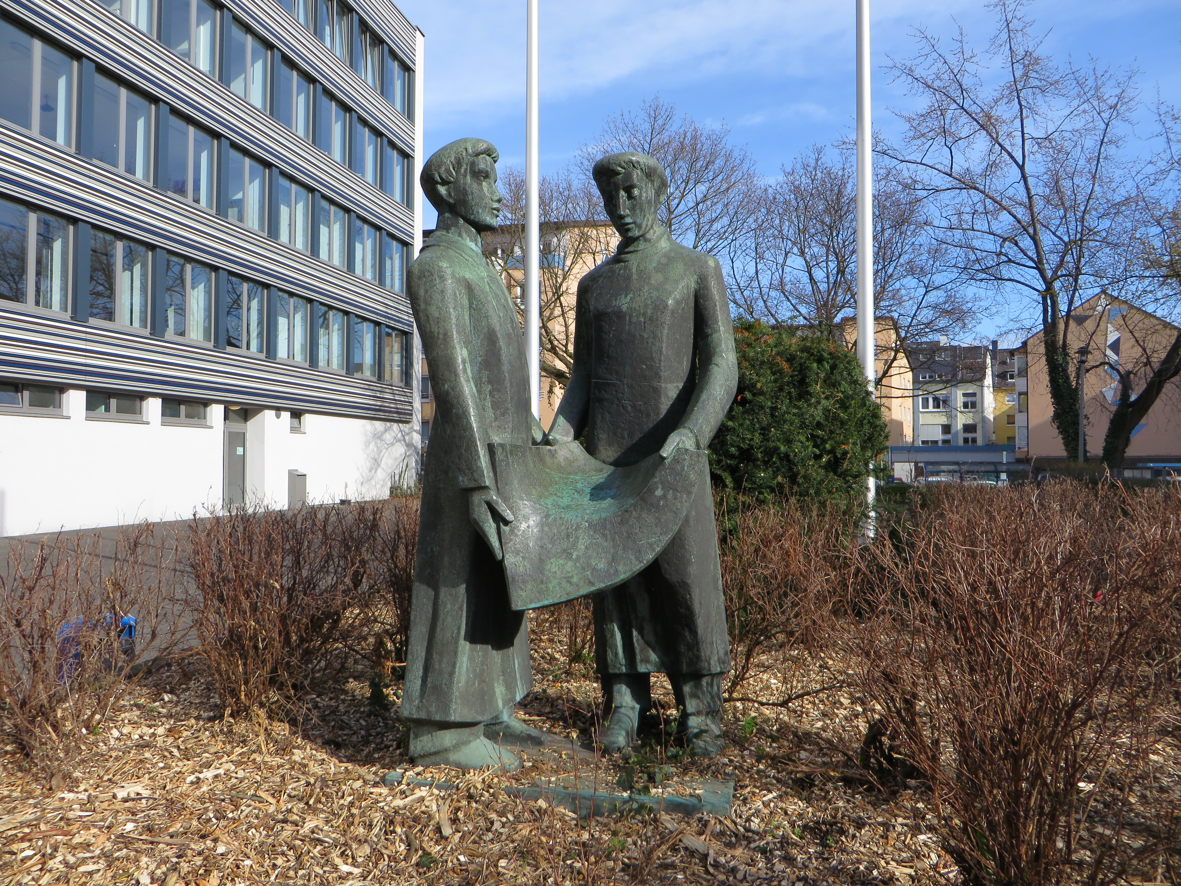 Bronze-Skulptur „Lehrer und Schüler“ in Hagen, im offenen Hof des Cuno-Berufskollegs I, Viktoriastraße 2. Die 185 cm hohe Plastik steht in einem Hochbeet und wurde 1951 von dem Bildhauer Kurt Schwippert erschaffen.